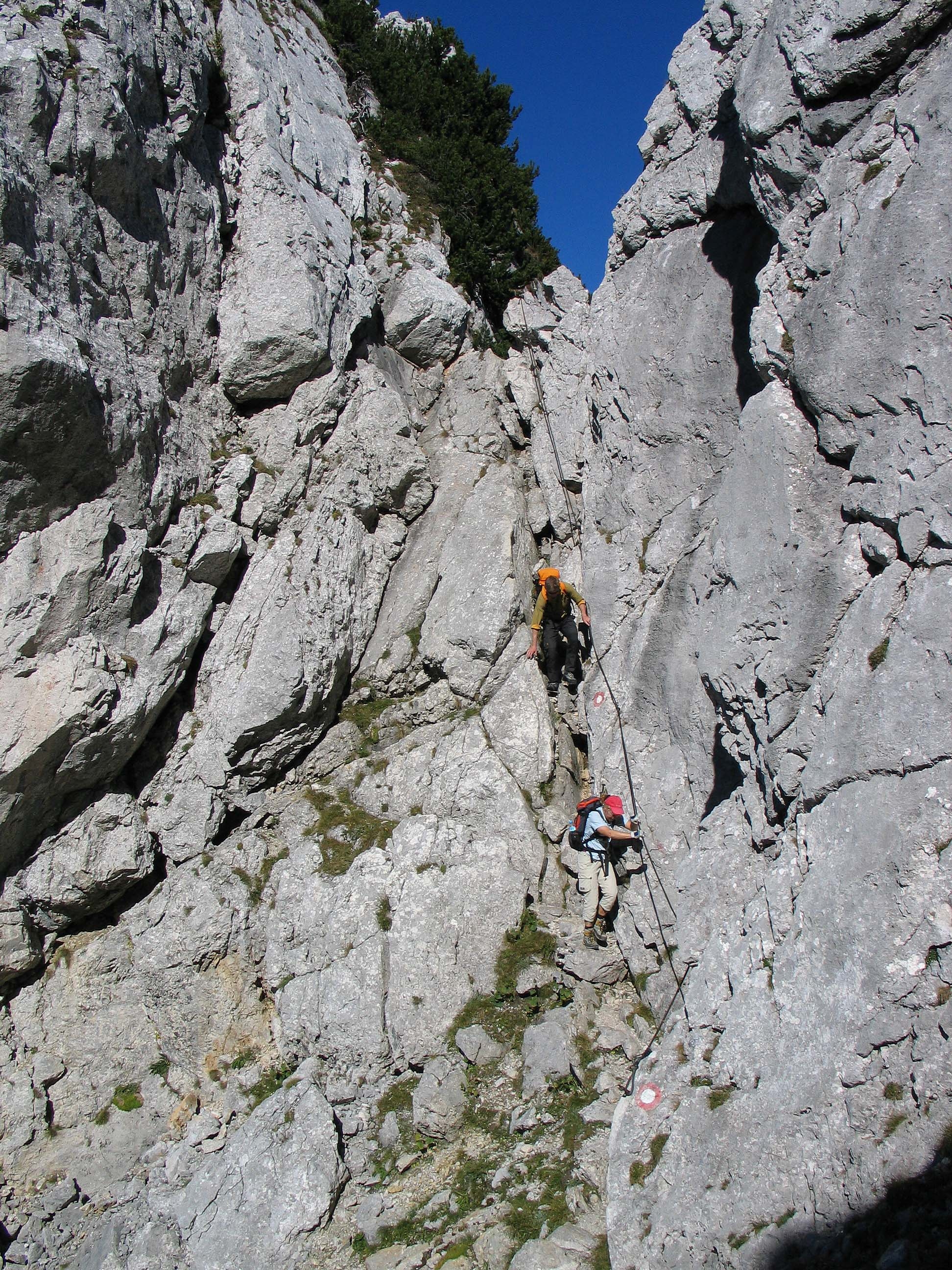 Am Mannlgrat, Berchtesgadener Alpen Photograph: Luidger (23. September 2006)